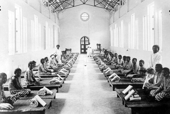 Repronegatief. Vrouwenziekenzaal in het Catharina-hospitaal van de Holland-Amerikaansche Planters Maatschappij te Kisaran, Sumatra